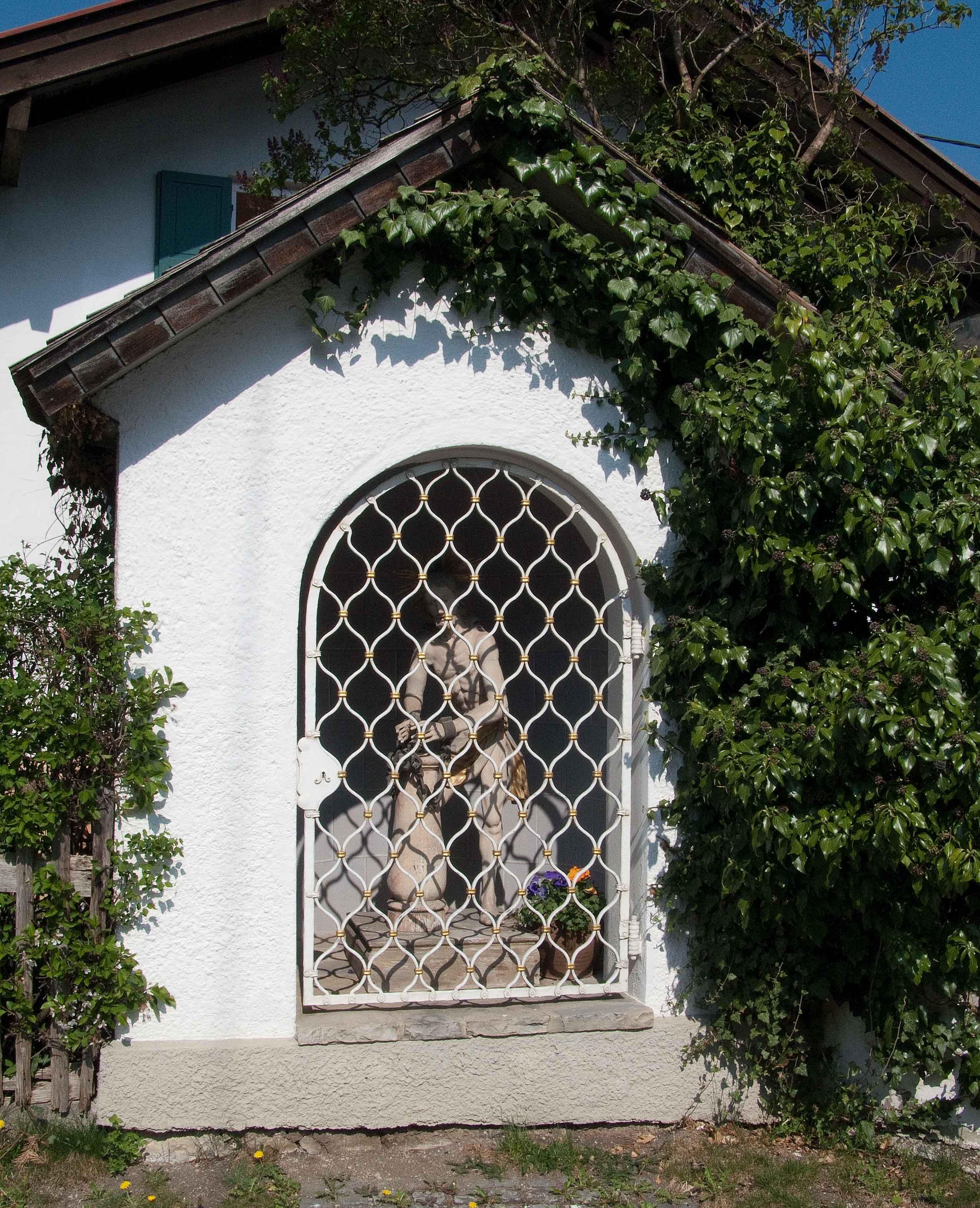 Kreuzackerkapelle, Farchant: im Kern Mitte 18. Jh.; mit Ausstattung